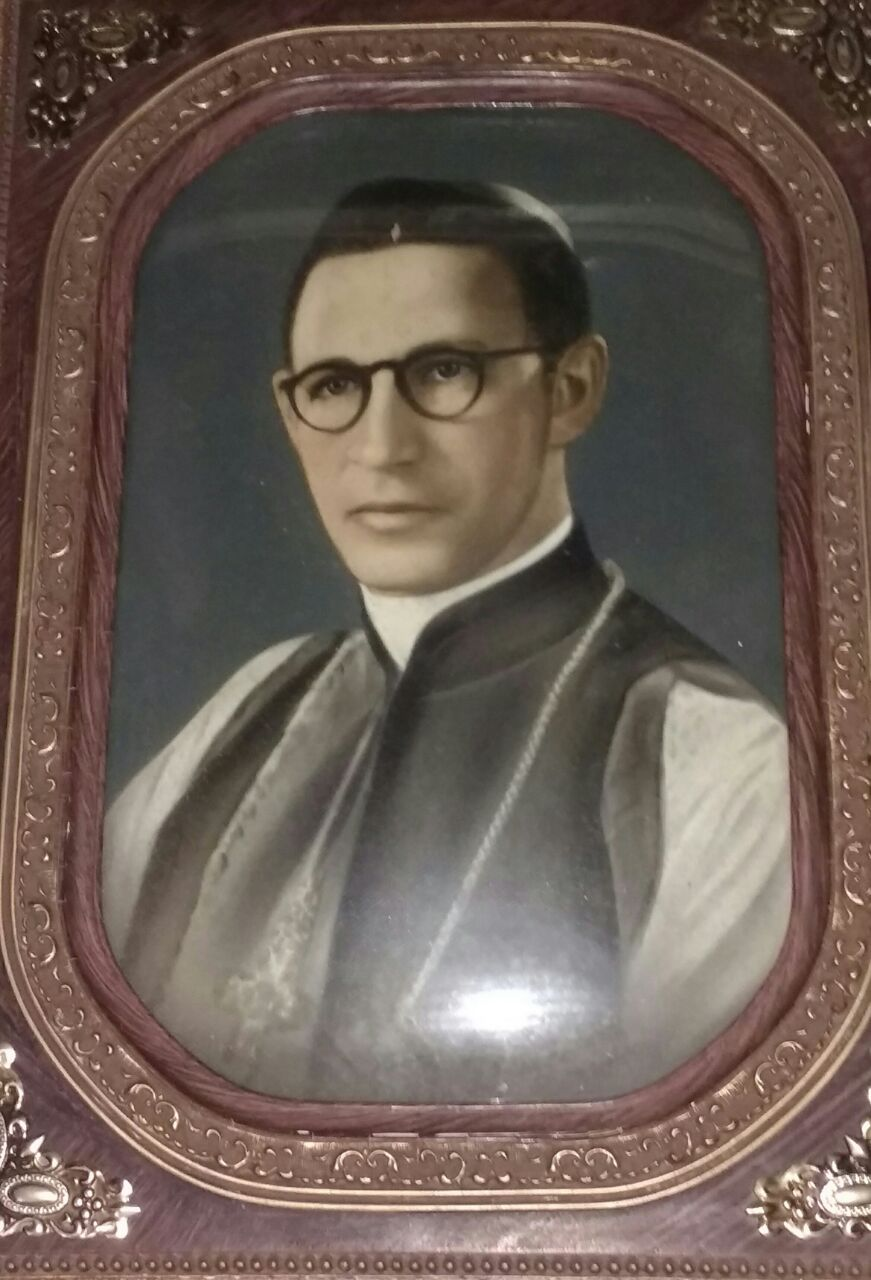 Abel Ribeiro Camelo